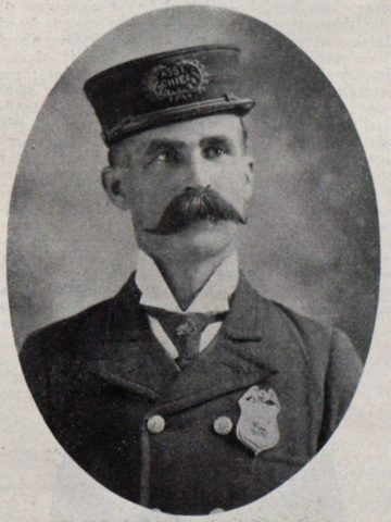 Louis Behrens in 1907.